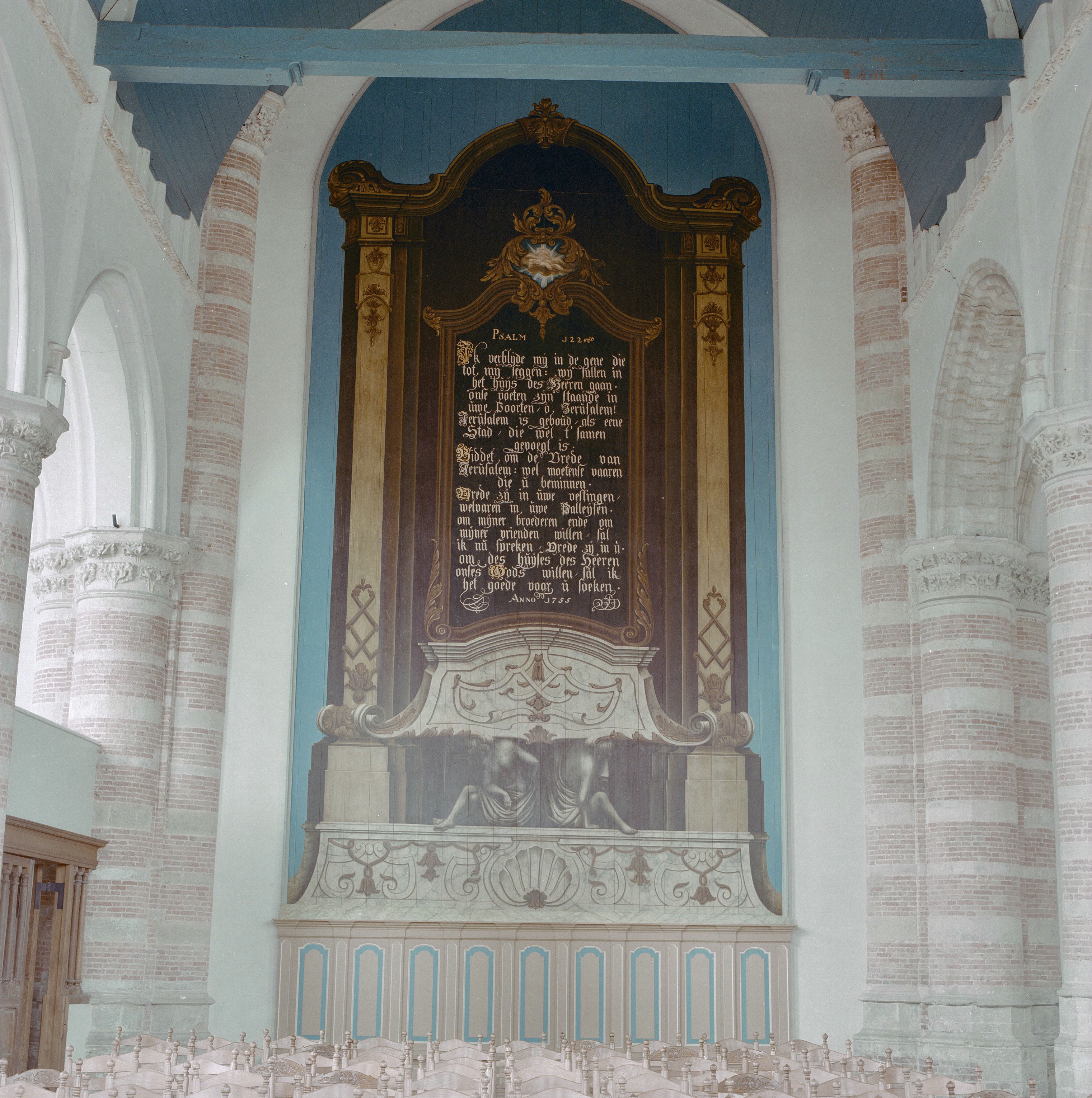 Nederlands Hervormde Kerk: INTERIEUR, KOOR, PSALMBORD